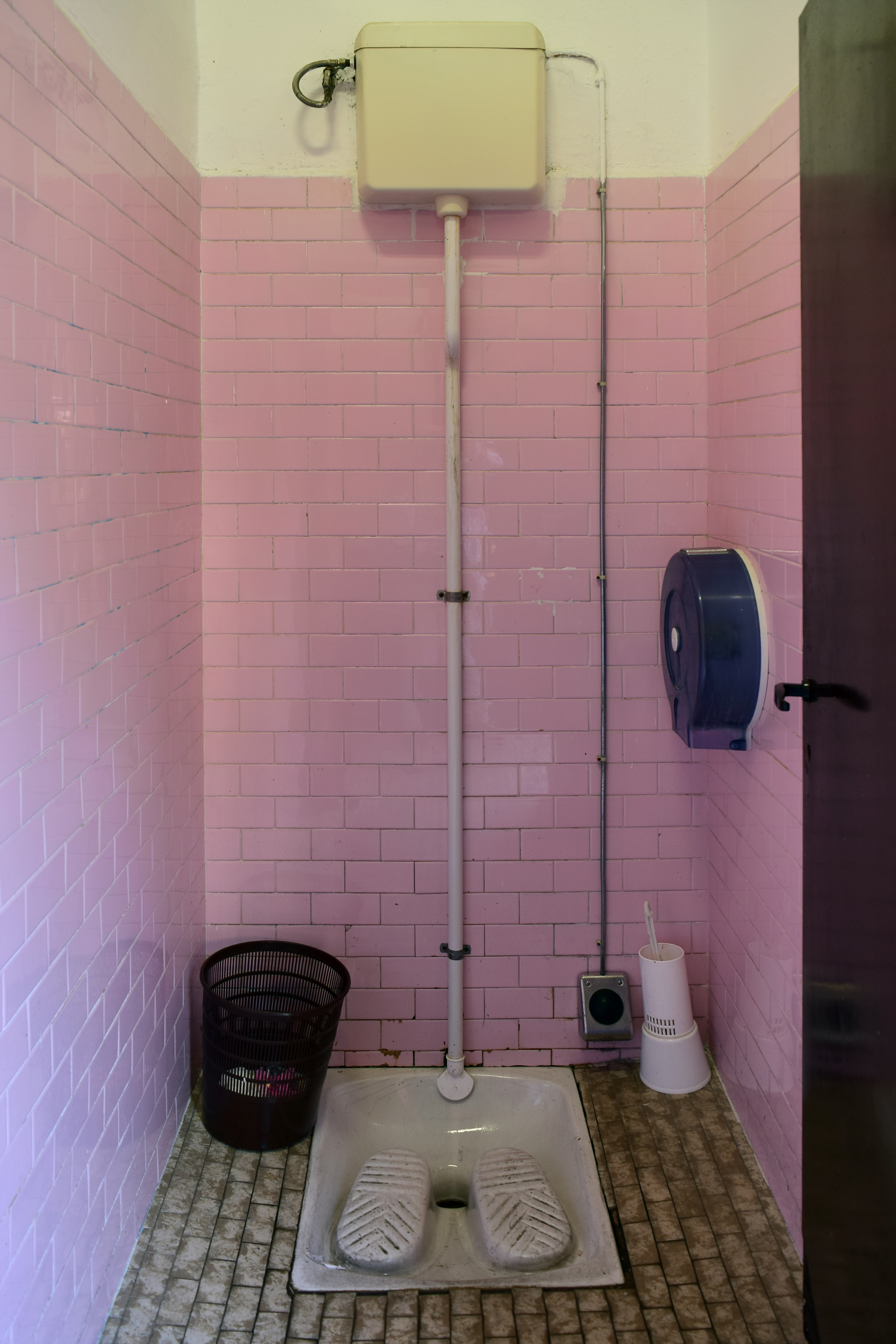 Hocktoilette am Bahnhof Varenna-Esino-Perledo